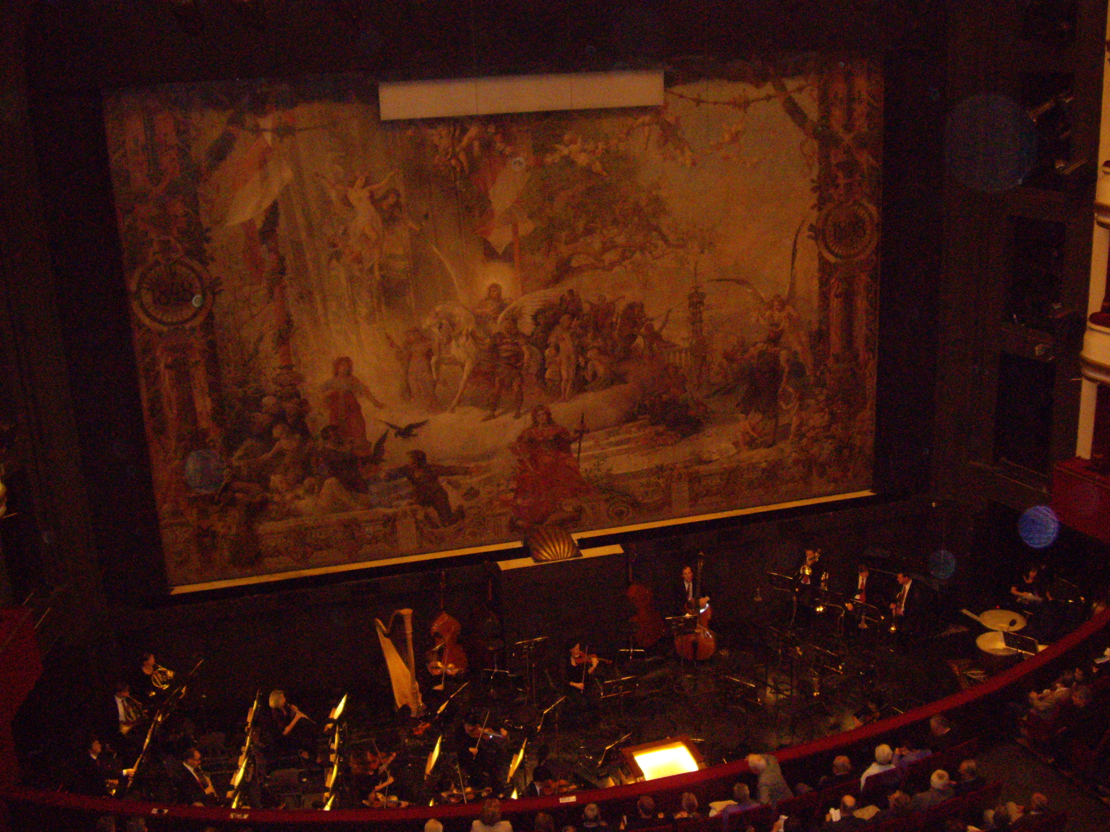 Fera kurteno de Popola Operejo Vieno.